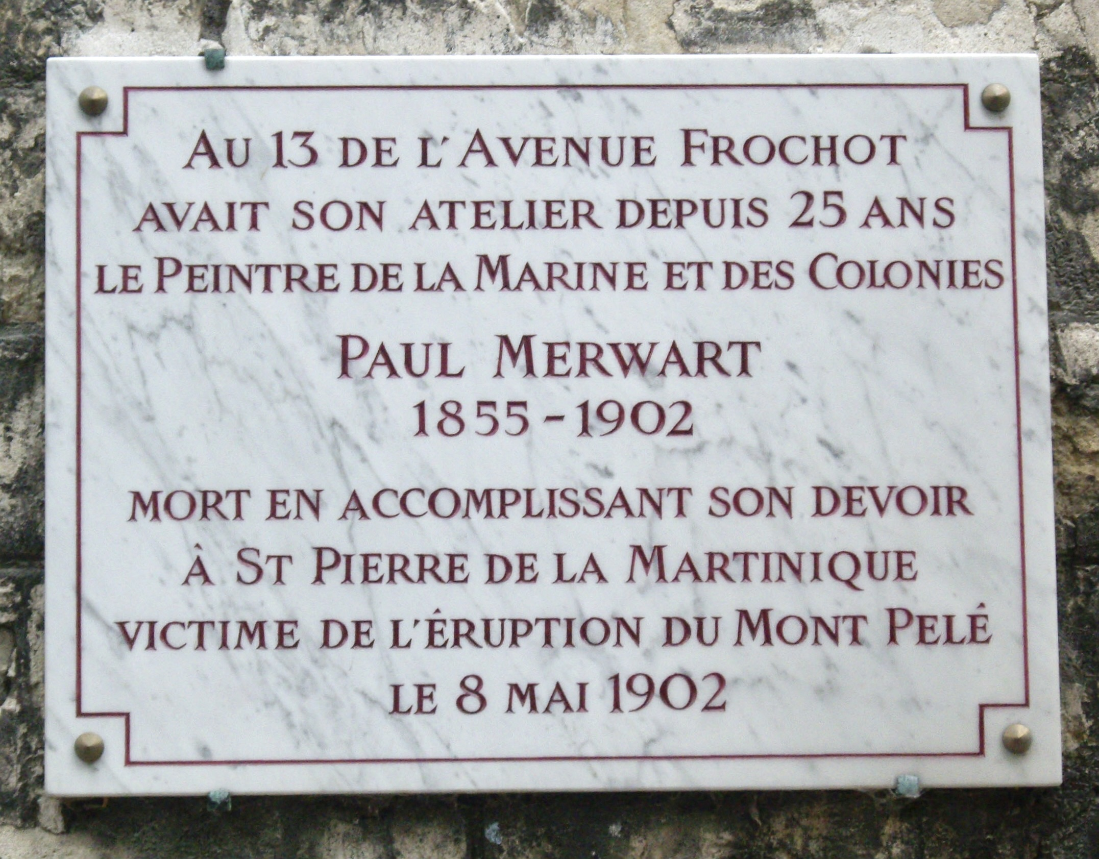 Plaque commémorative, 13 avenue Frochot, Paris 9e.« Au 13 de l'avenue Frochot, avait son atelier depuis 25 ans le peintre de la marine et des colonies Paul Merwart, 1855-1902, mort en accomplissant son devoir à St Pierre de la Martinique, victime de l'éuption du mont Pelée le 8 mai 1902. »